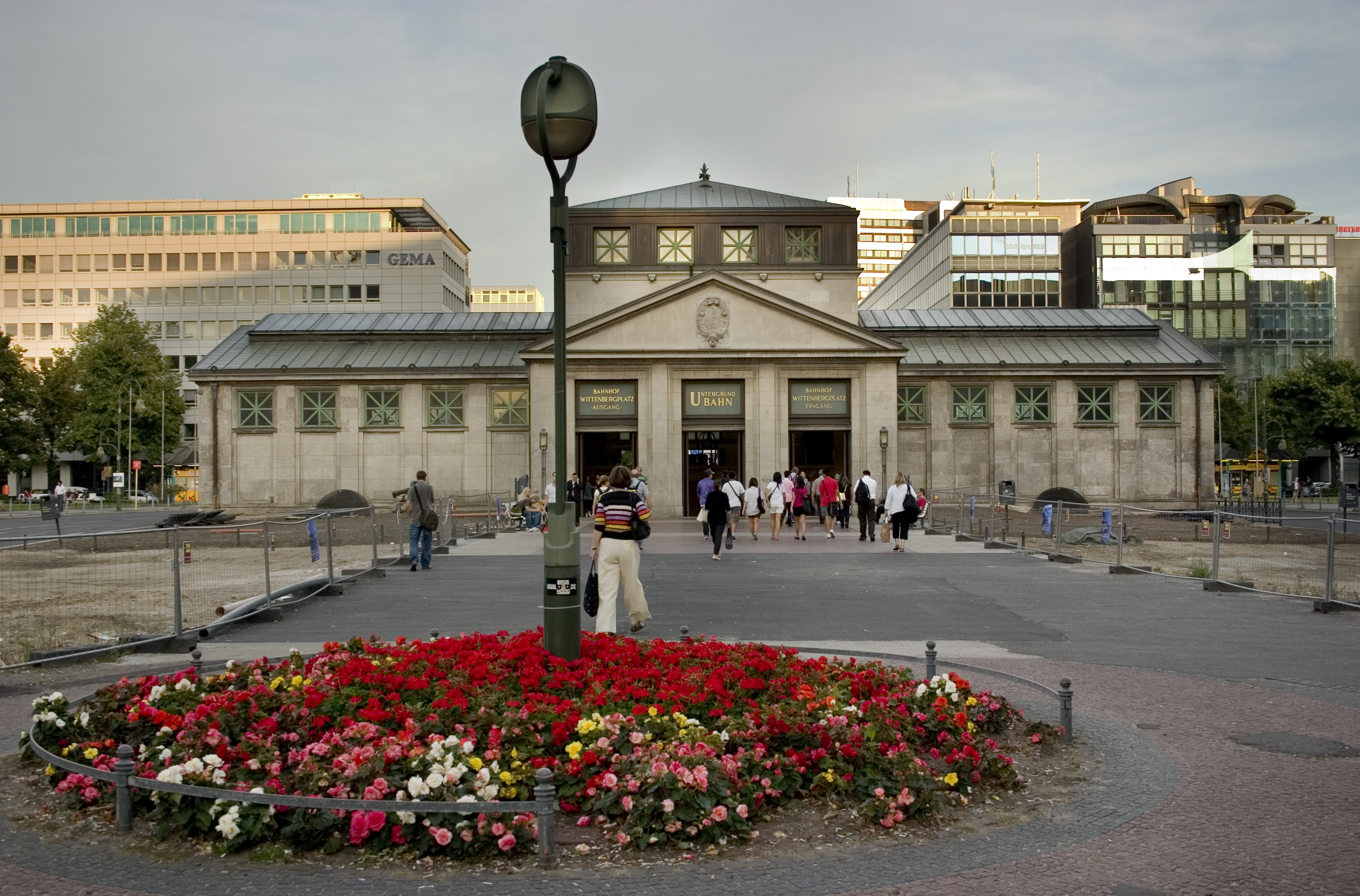 Wittenbergplatz